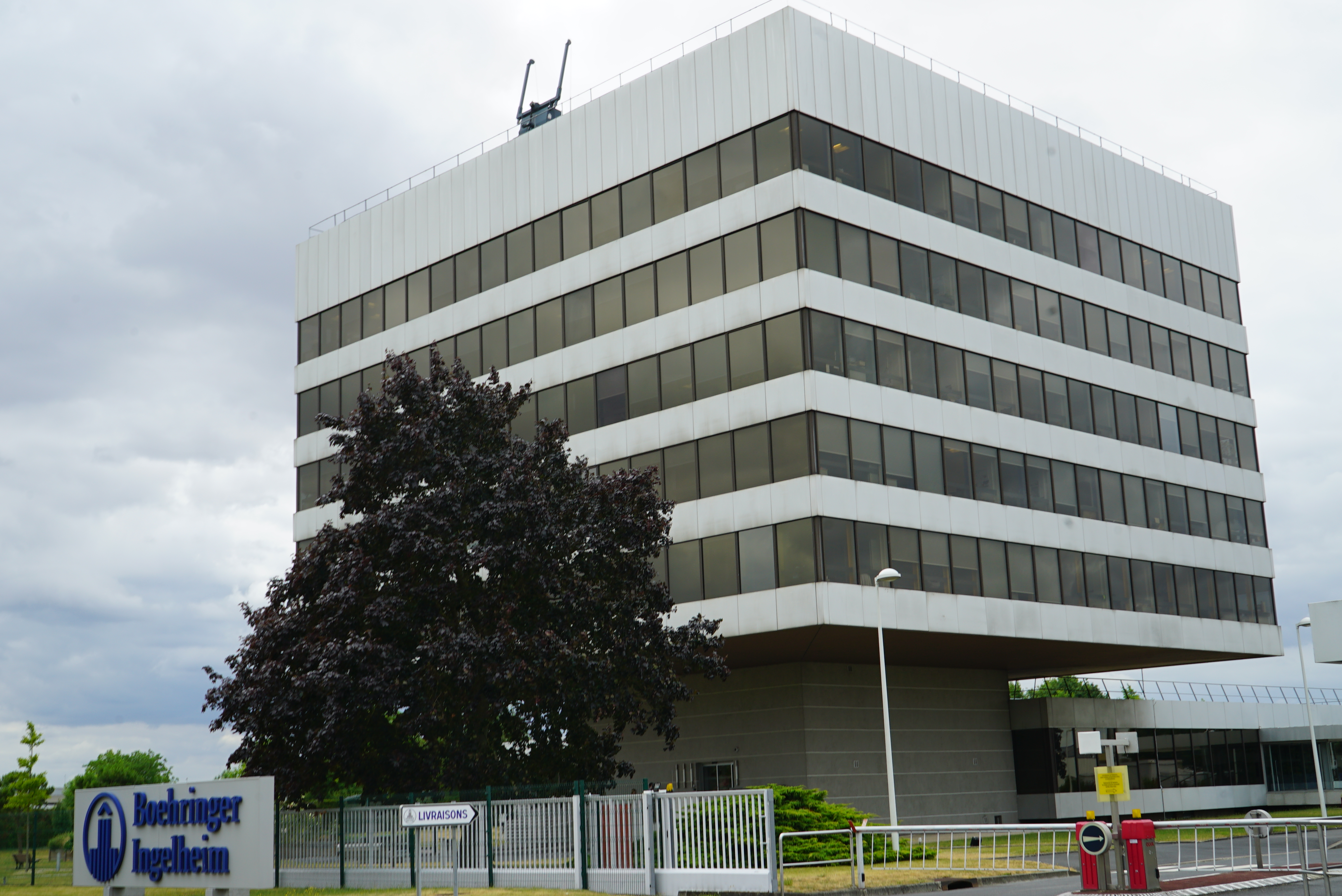 vue de l'usine de Boehringer-Ingelheim